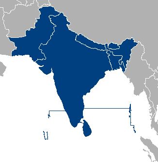 Pays faisant partie de l'ASACR, ce qui n a pas toujours été historiquement prouvé.